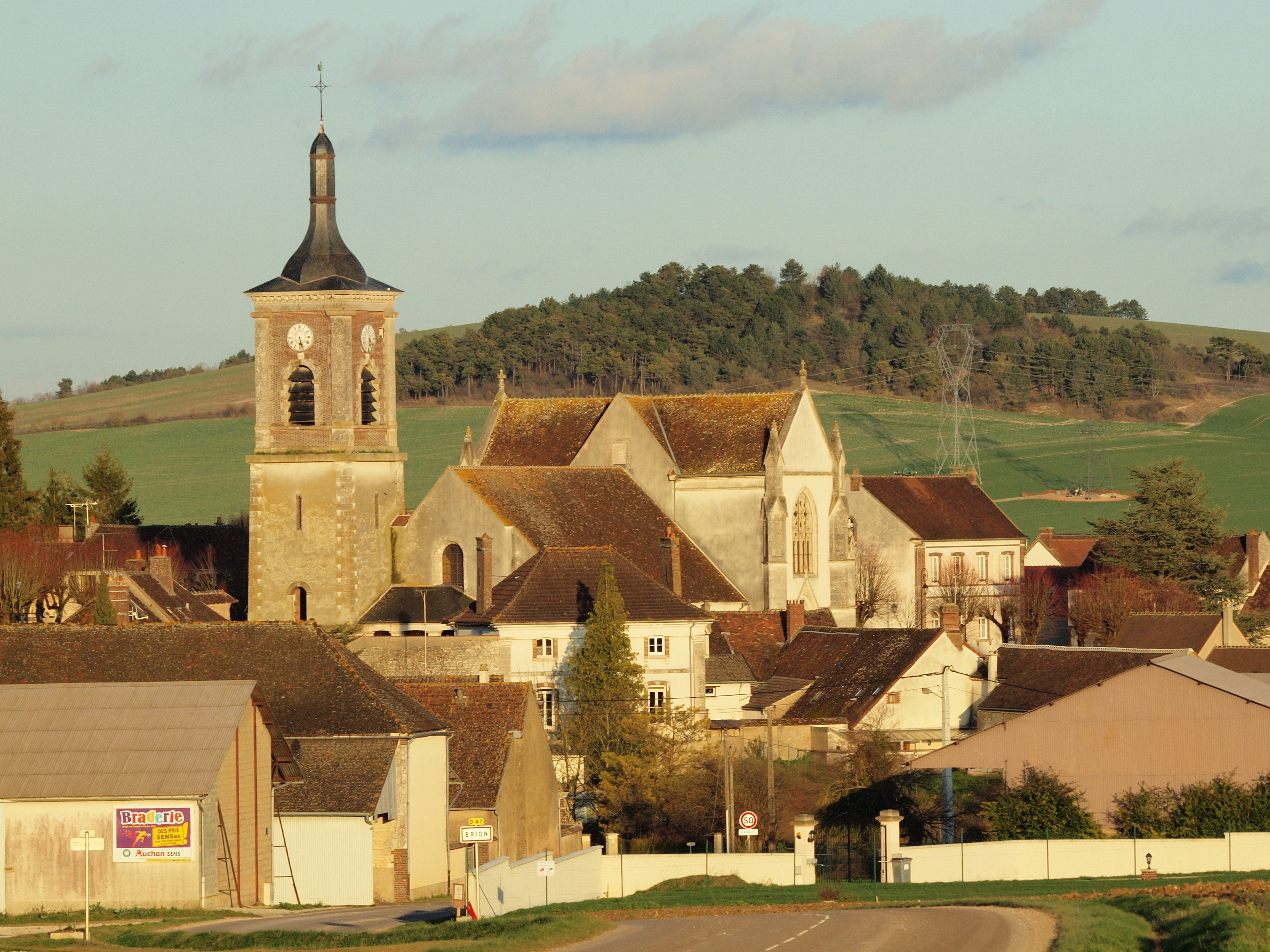 Brion (Yonne, France)